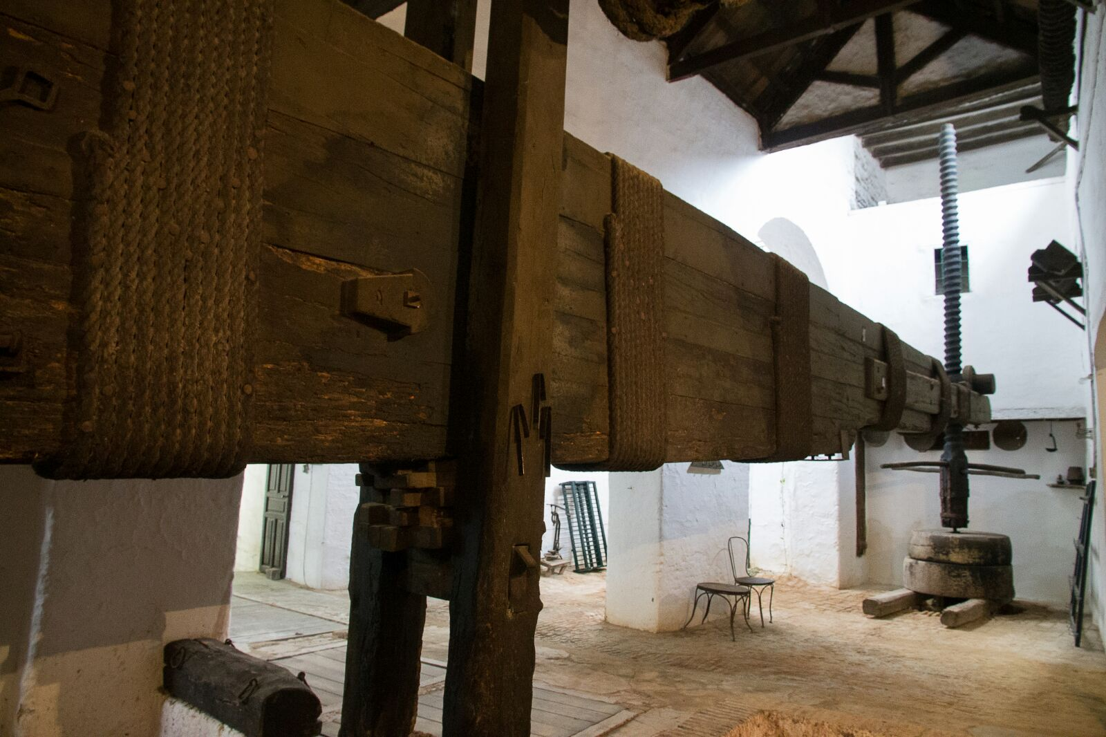 La prensa de Viga de Husillo y Quintal, junto con el antiguo lagar, datan del año 1.574, según documentos aparecidos en la antigua Hacienda de Pata de Hierro son la parte más antigua de la Bodega catalogada como Monumento (BIC).